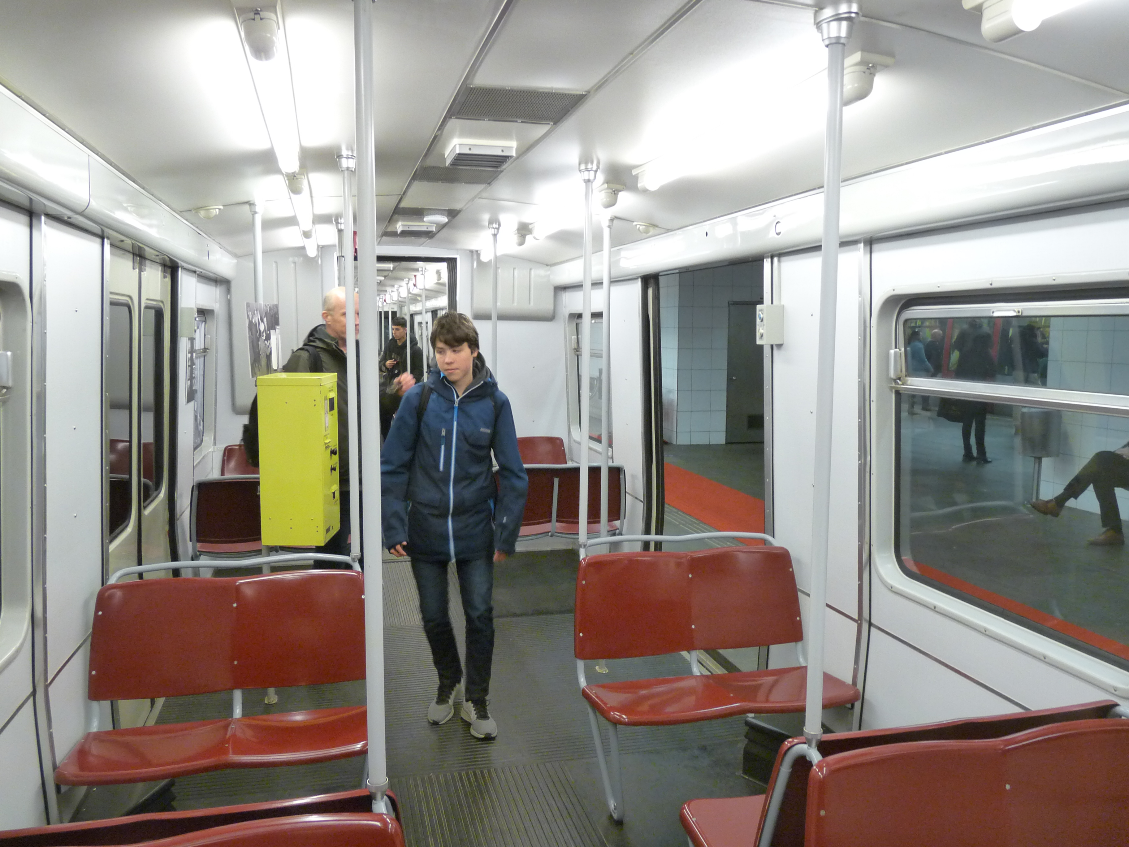 Het oud metromatrieel wordt in metrostation Blaak tentoongesteld.